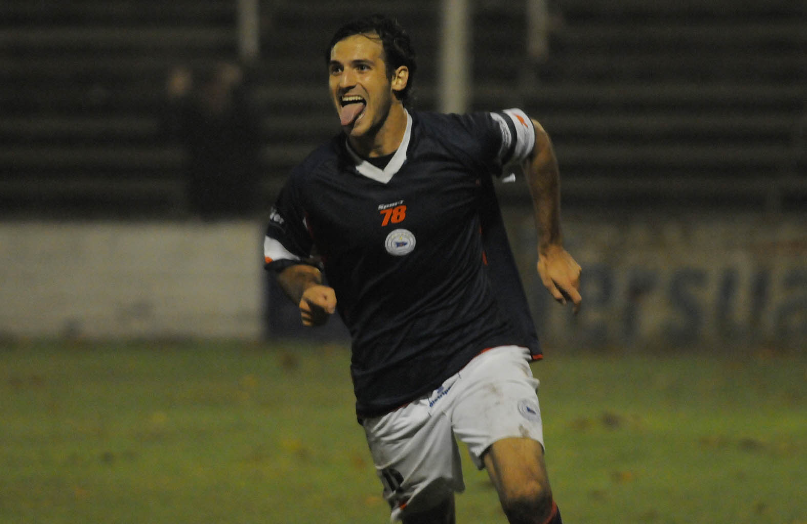 Central Córdoba vs Alem. ALEJANDRO FIORINA se eleva con una tijera para clavar el derechazo que abrió el marcador. El delantero exigió mucho a la defensa de Alem.